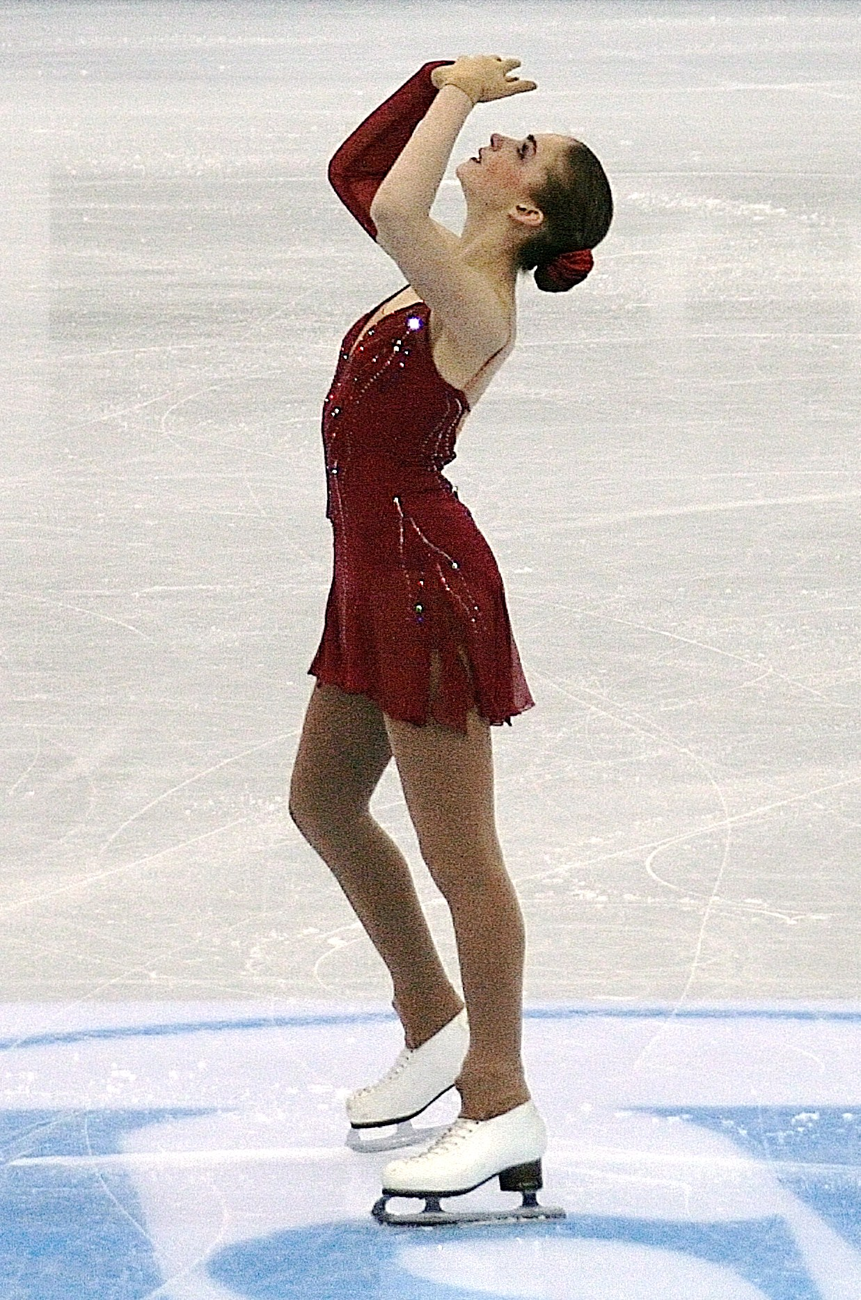 Инга Янулевичюте (Литва) на чемпионате мира по фигурному катанию 2012.